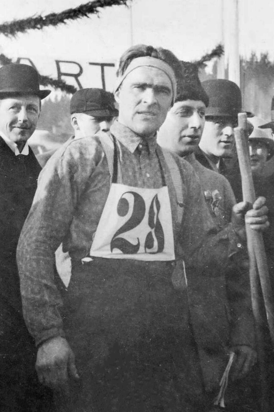 John Lindgren